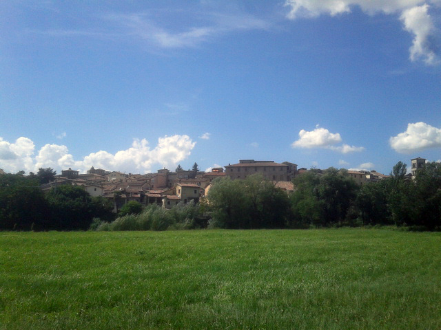 Rieti vista del centro storico dalla pista ciclabile